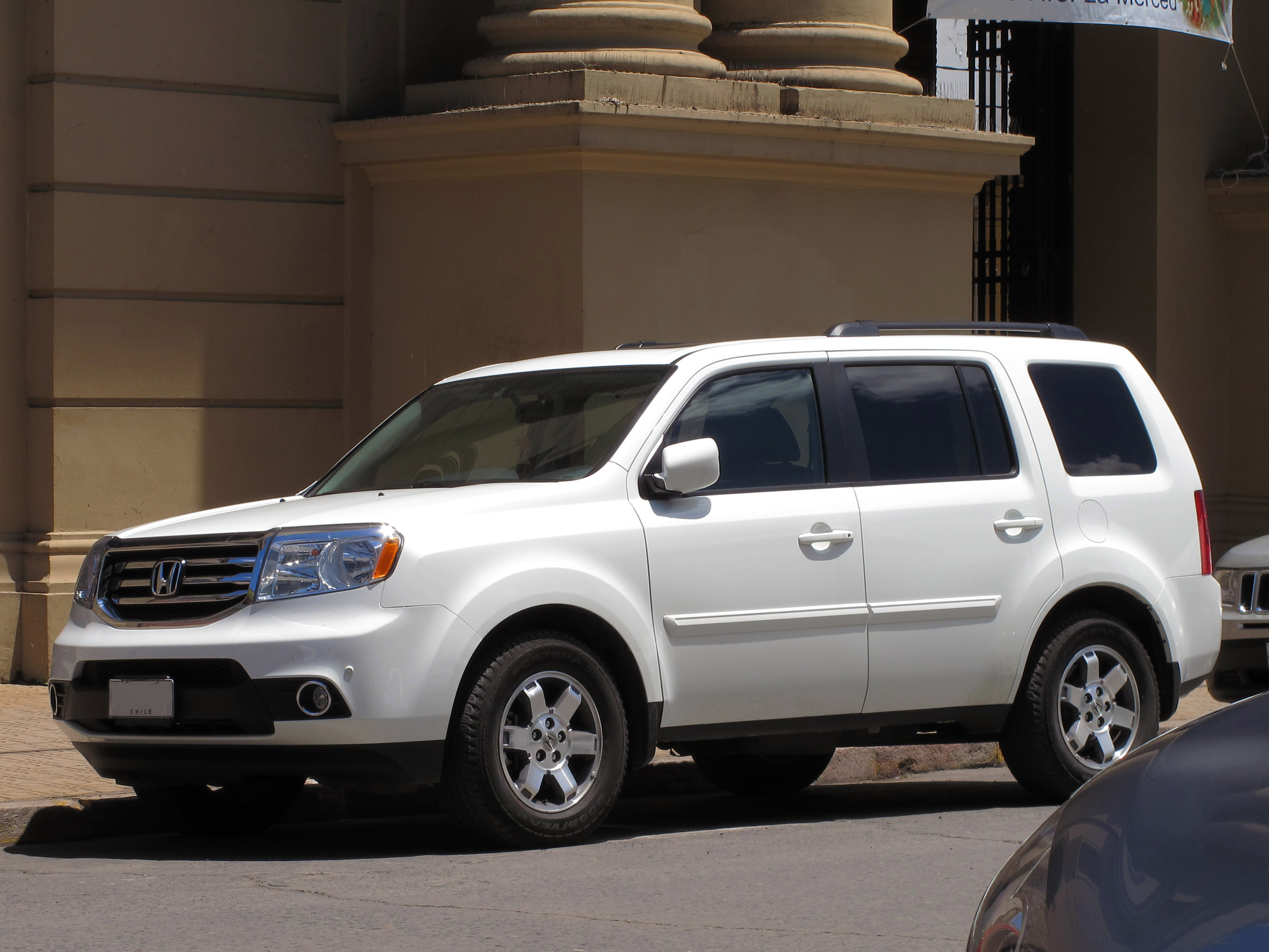 Honda Pilot EXL 4WD 2013